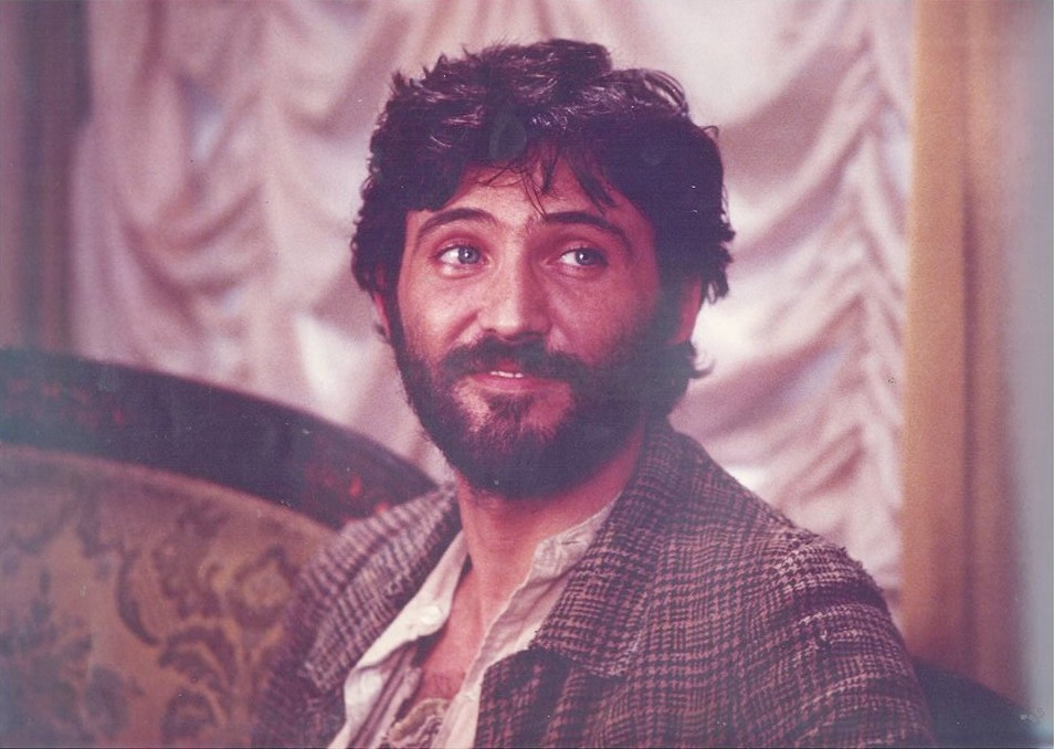 Кадр cо съемок сериала "Мартин Иден" (1979). Станко Мольнар в роли Бенджамина. Фото сделано другом Станко Витторио Менезини для личного архива Станко Мольнара